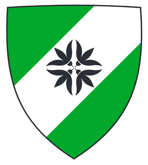 Lüganuse valla vapp 2018